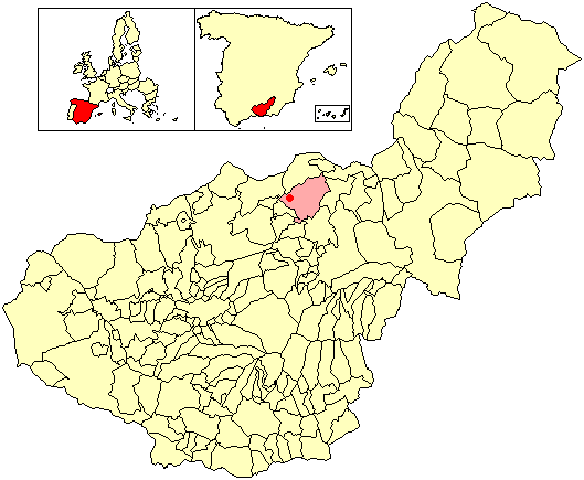 Situación del despoblado de Uleilas Bajas (en el municipio de Pedro Martínez) respecto a la provincia de Granada, en España.